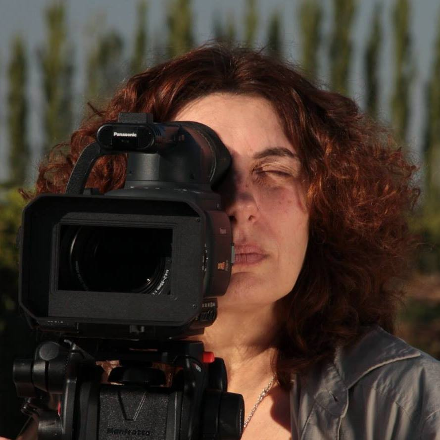 Cristina Raschia Guionista y Realizadora Audiovisual